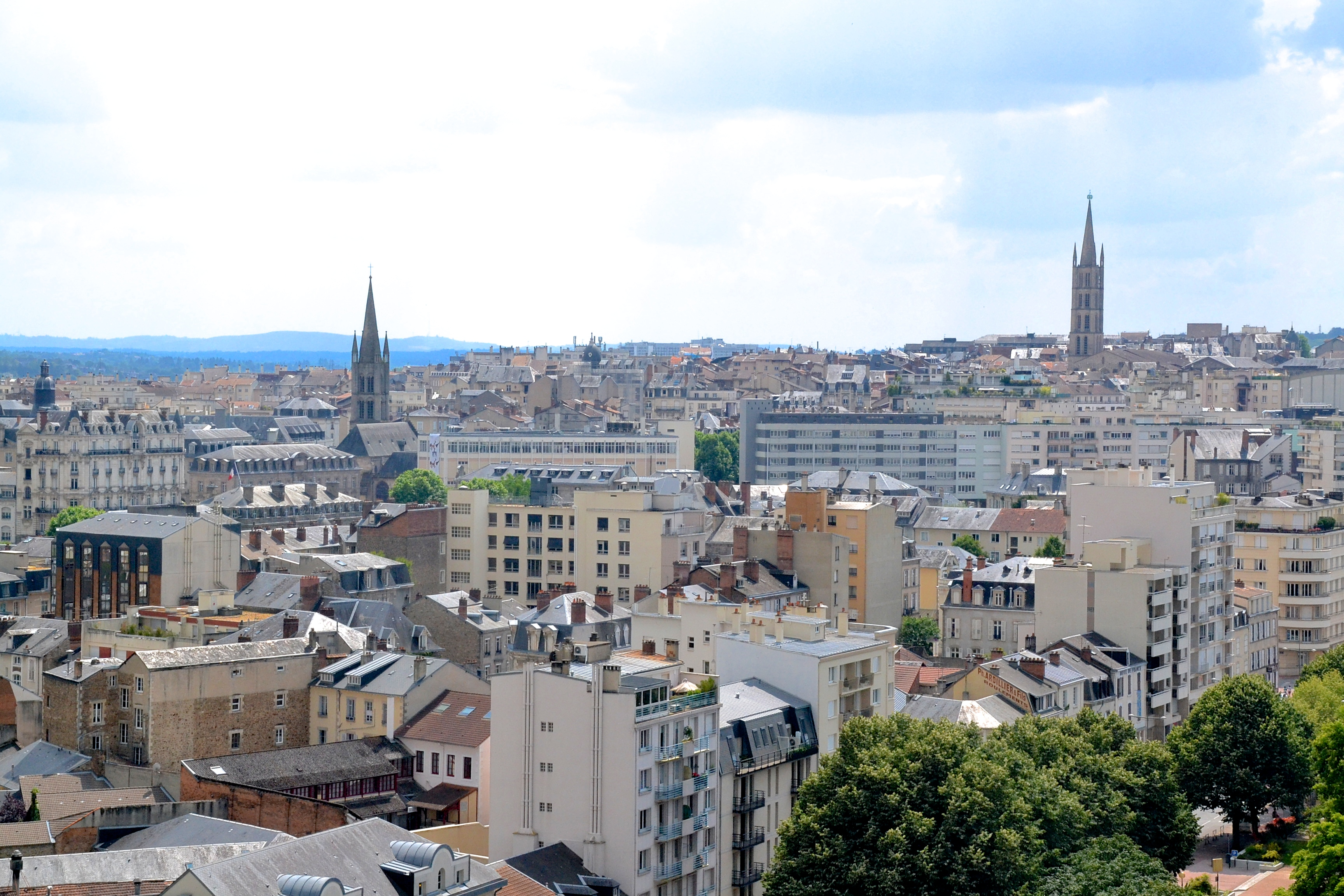 Vue sur le centre-ville de Limoges depuis le campanile de la gare.